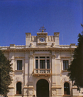 Palazzo San Giorgio (municipio) , Reggio Calabria municipal palace